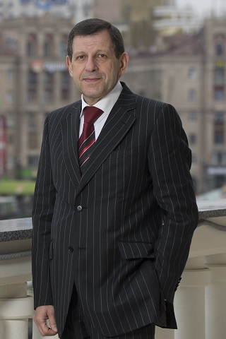 Председатель Правления Укркоопсоюза Гороховский Илья Леонидович